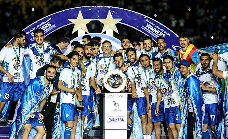 قهرمانی استقلال در فینال جام حذفی